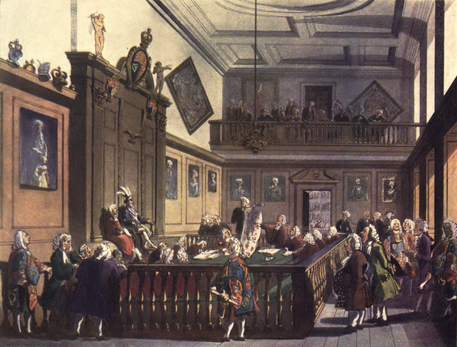 Heralds' College